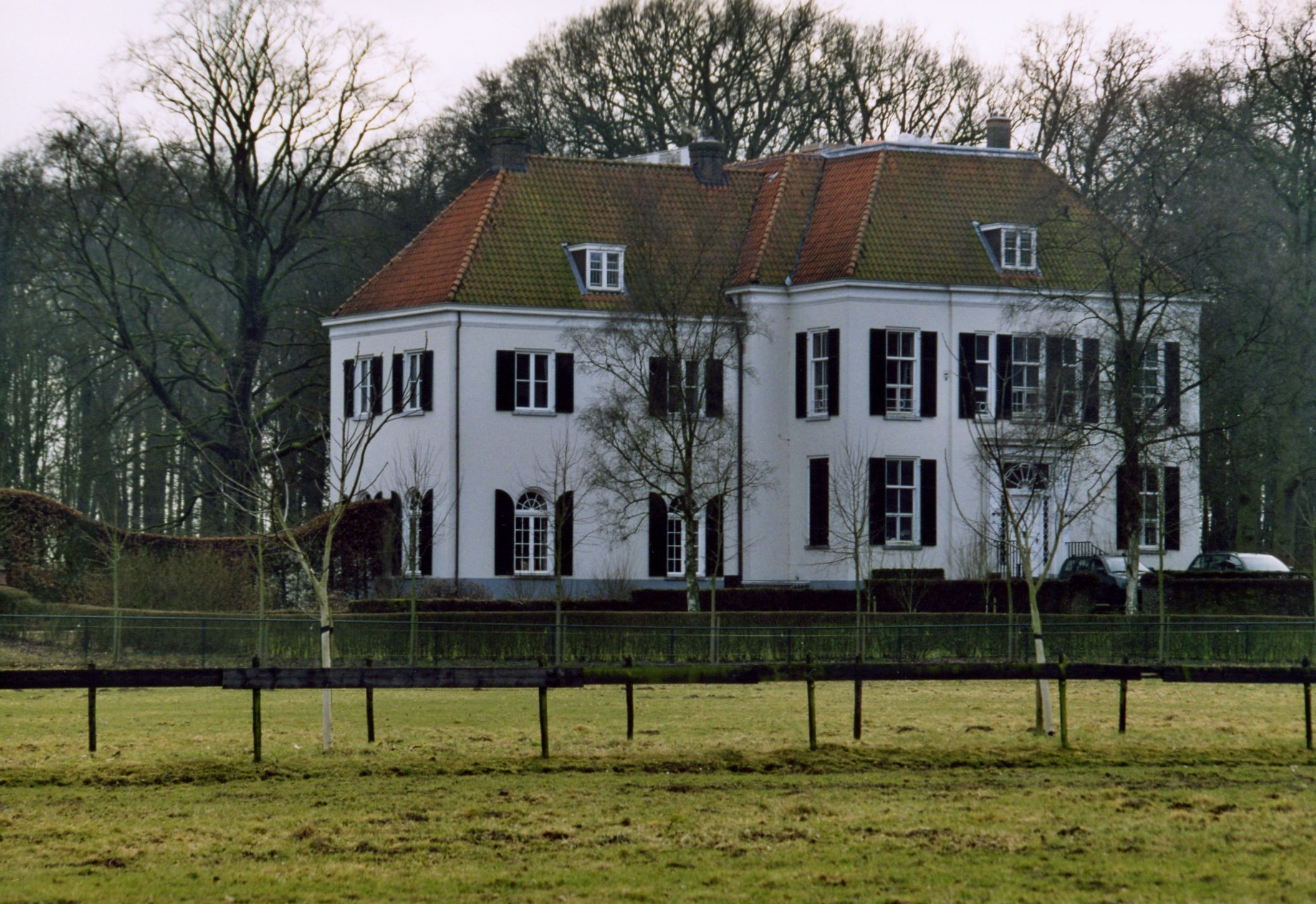 Huis Oosterhout (vervanger van het verdwenen kasteel Notesteijn) te Oosterhout.